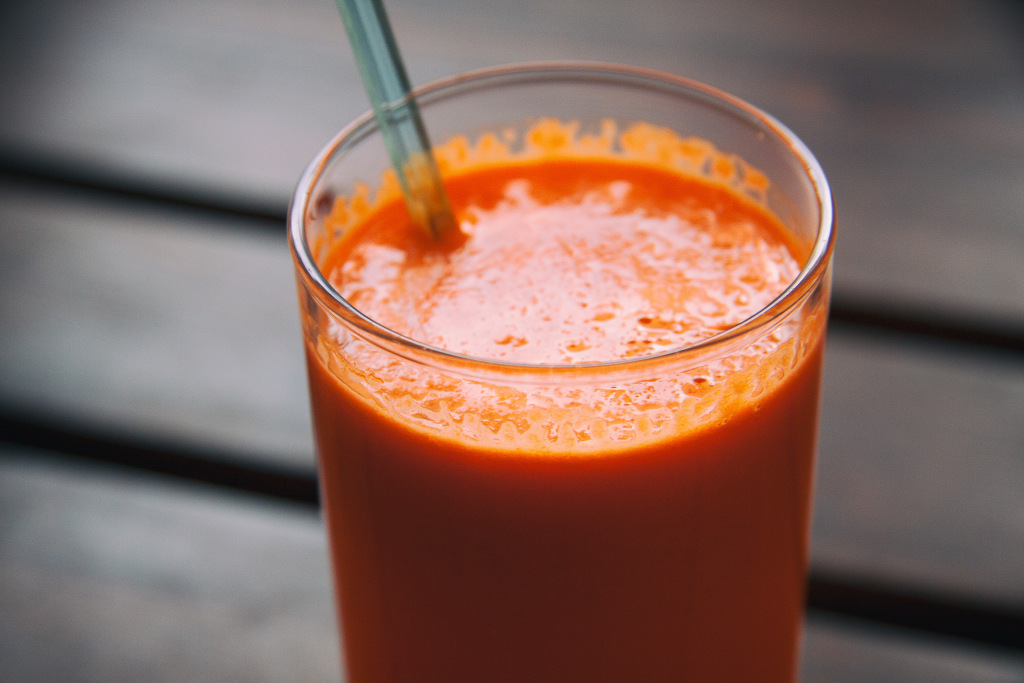 Sok z marchwi i jabłek.